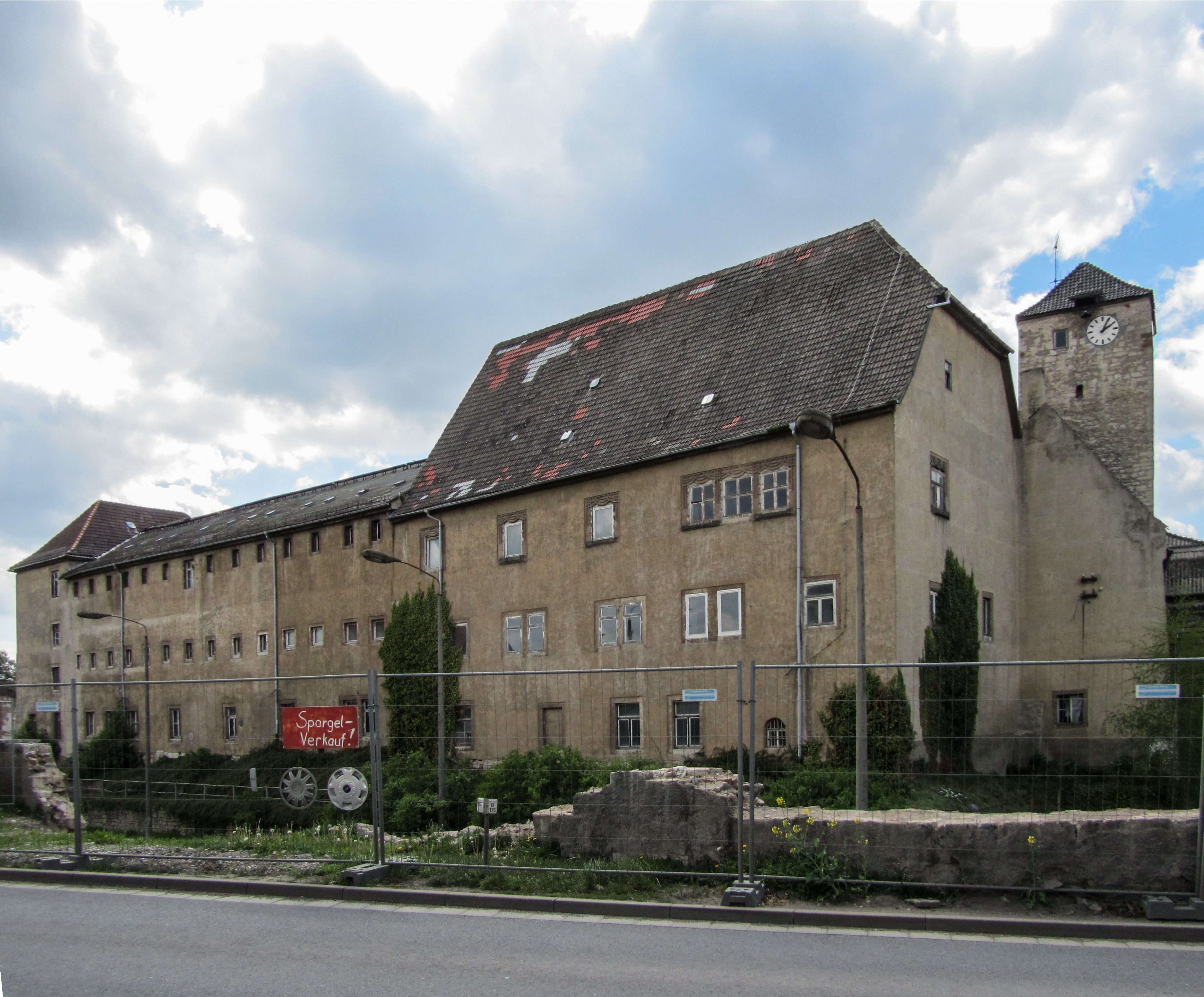 Die Kettenburg in Gräfentonna (Thüringen).